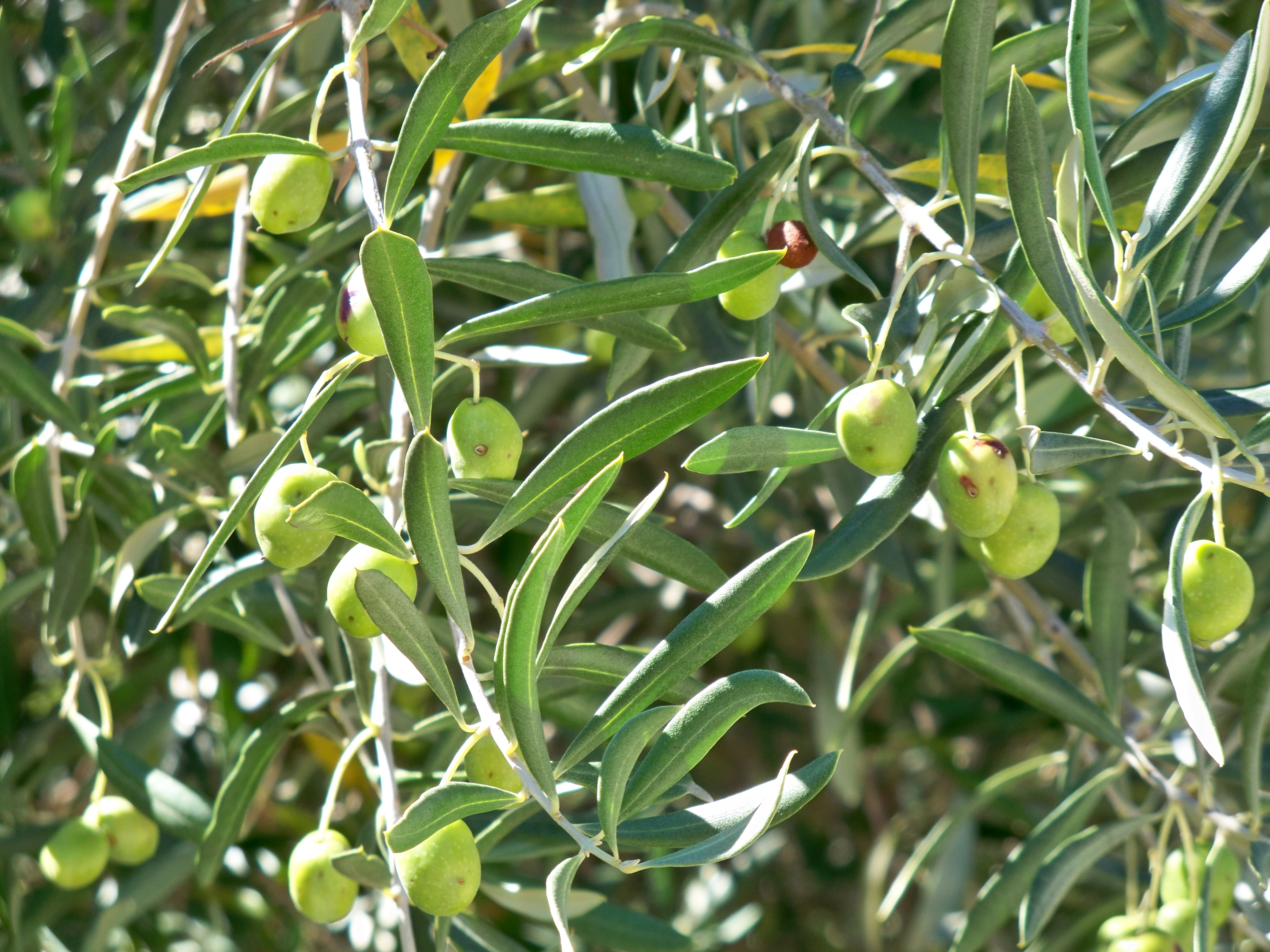 Oliveraie gardoise